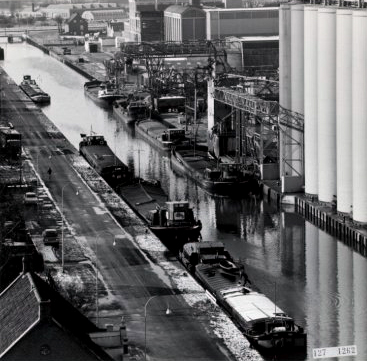 Oude haven Veghel, Zuidkade, Zuid-Willemsvaart